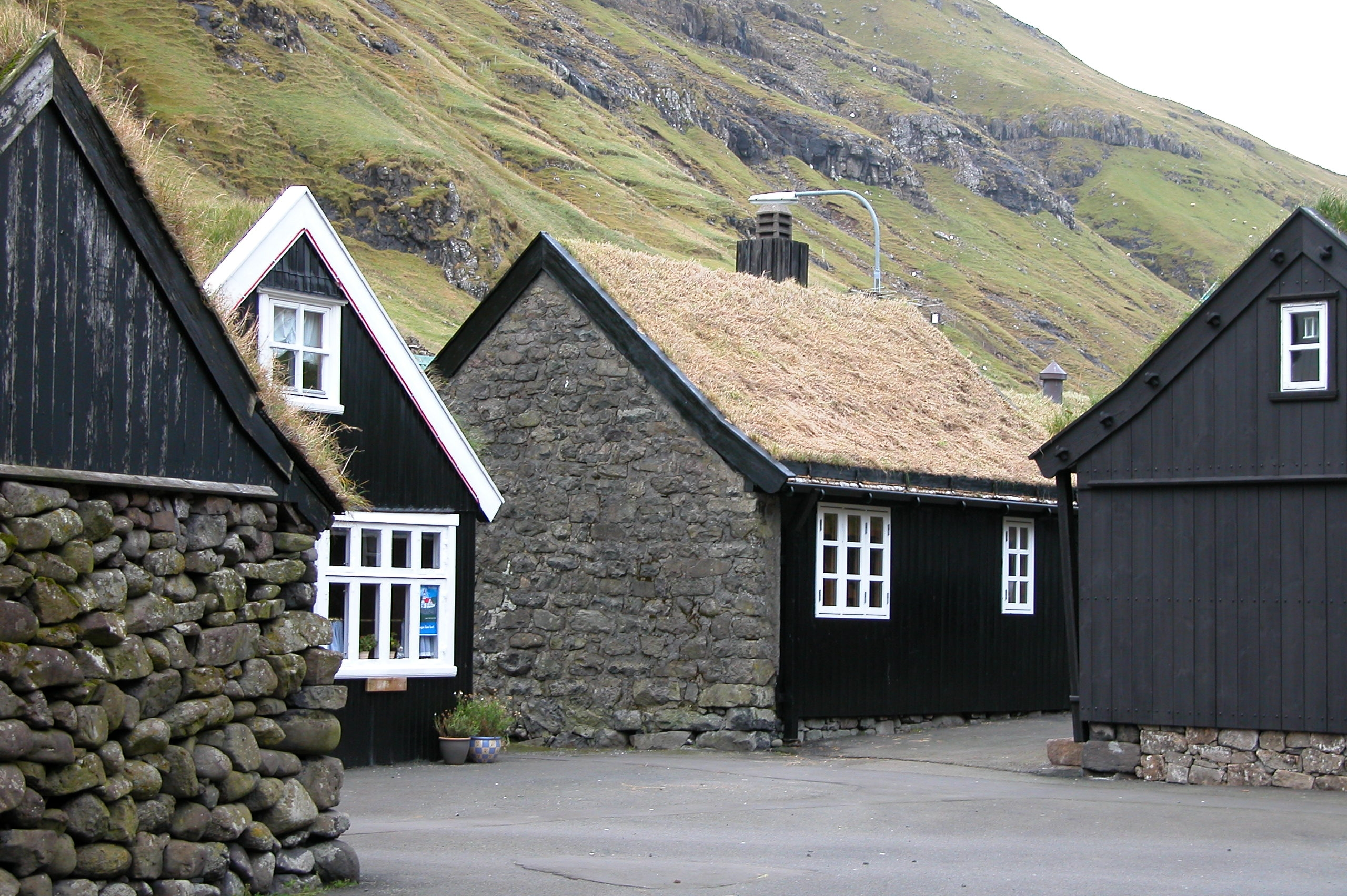 Tjørnuvík on Streymoy, Faroe Islands